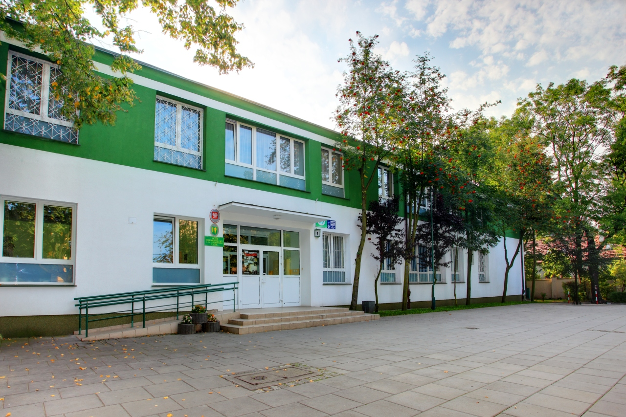 budynek szkoły I LO w Kutnie